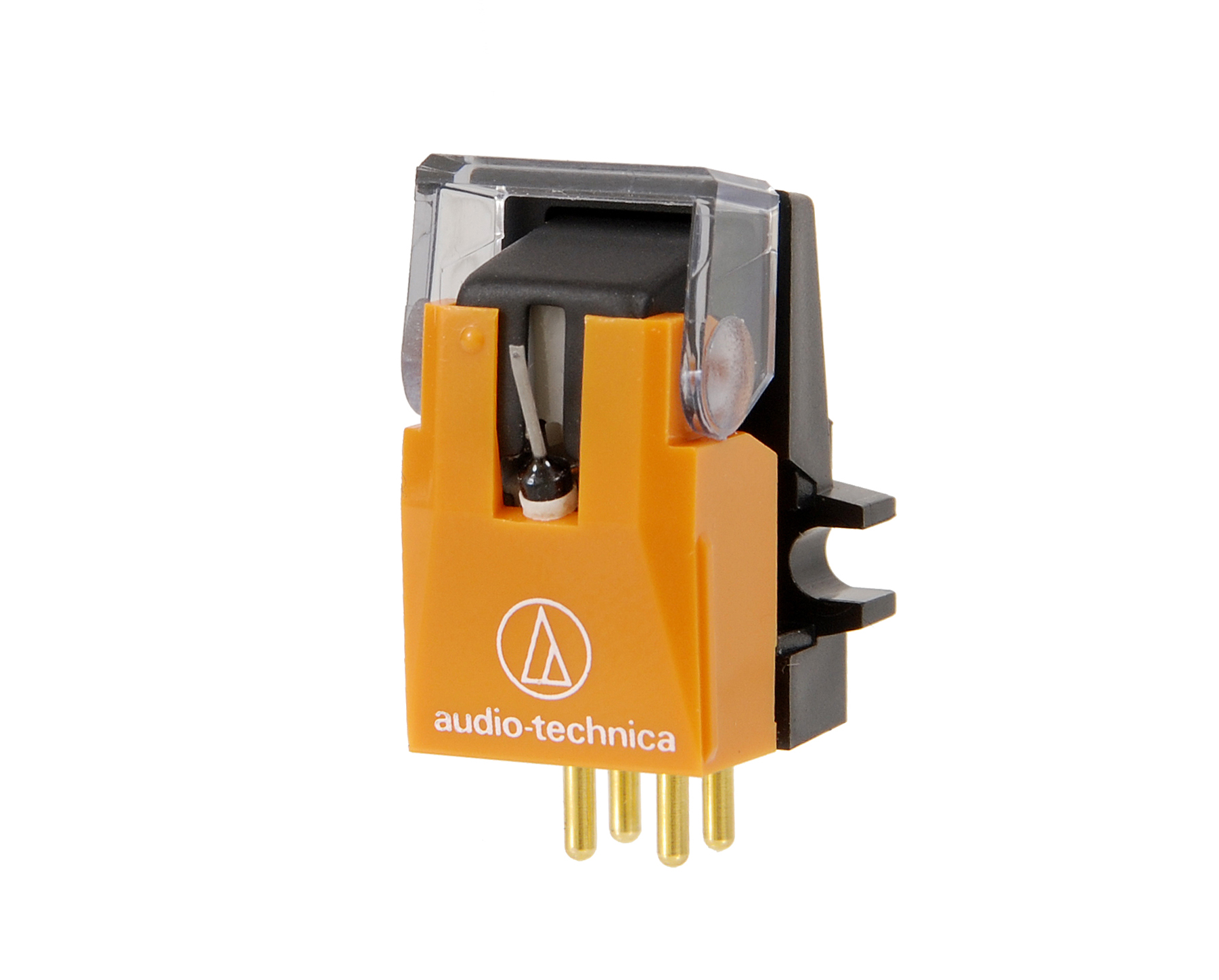 27 Wkładka gramofonowa AT-120E T firmy Audio Technica